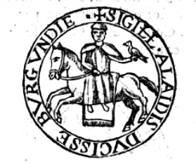 Alix de Vergy